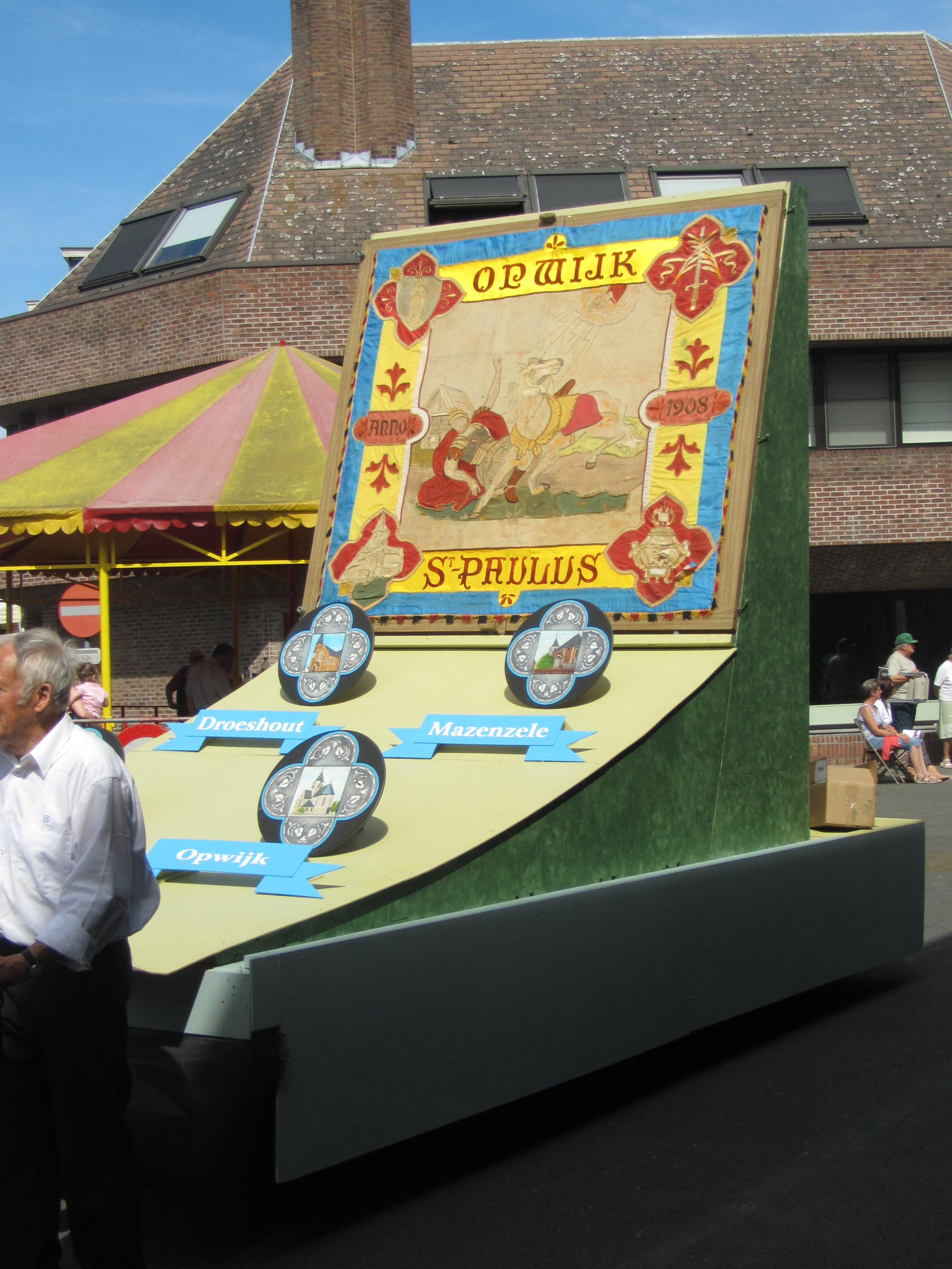 De oudste vlag van 1908 van het Broederschap van Sint-Paulus, opgericht in 1903. Deze vlag werd in 2000 gerestaureerd en op een praalwagen meegedragen in de processie